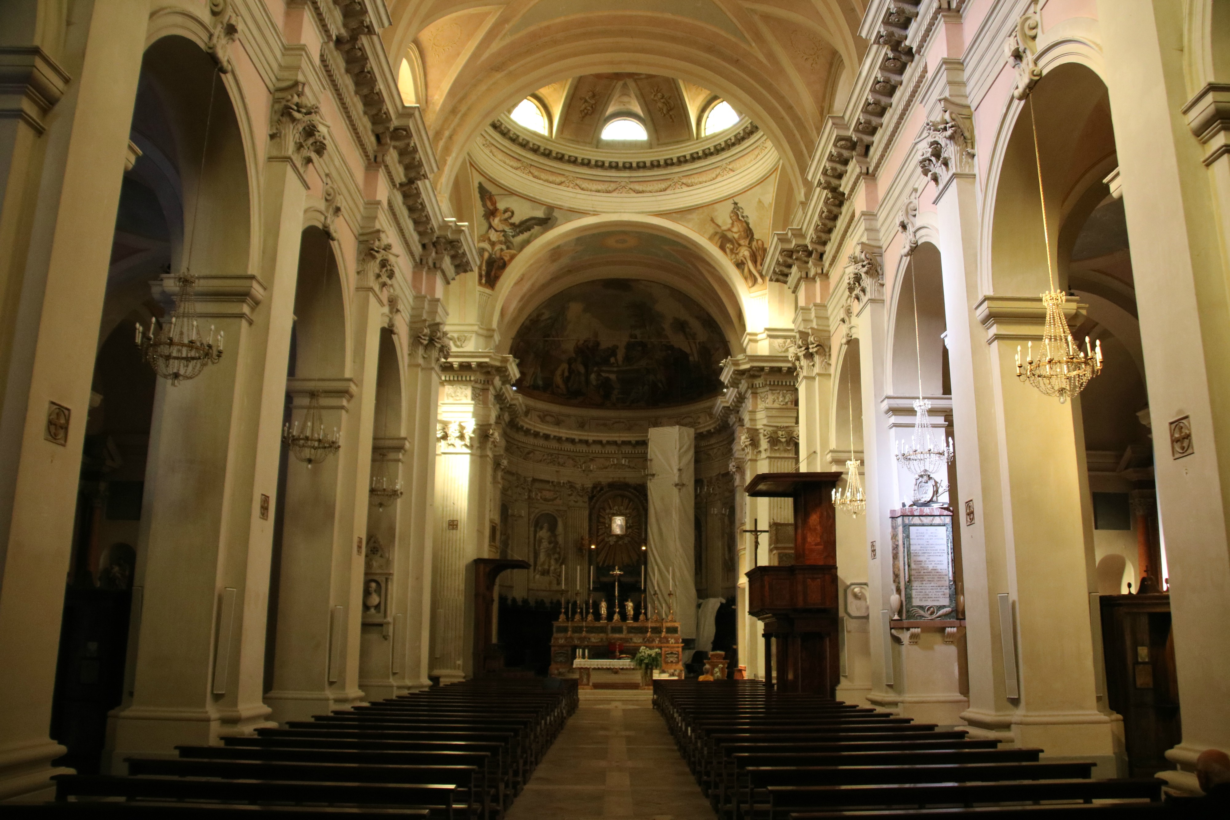 Concattedrale di Santa Maria Assunta (Cagli)